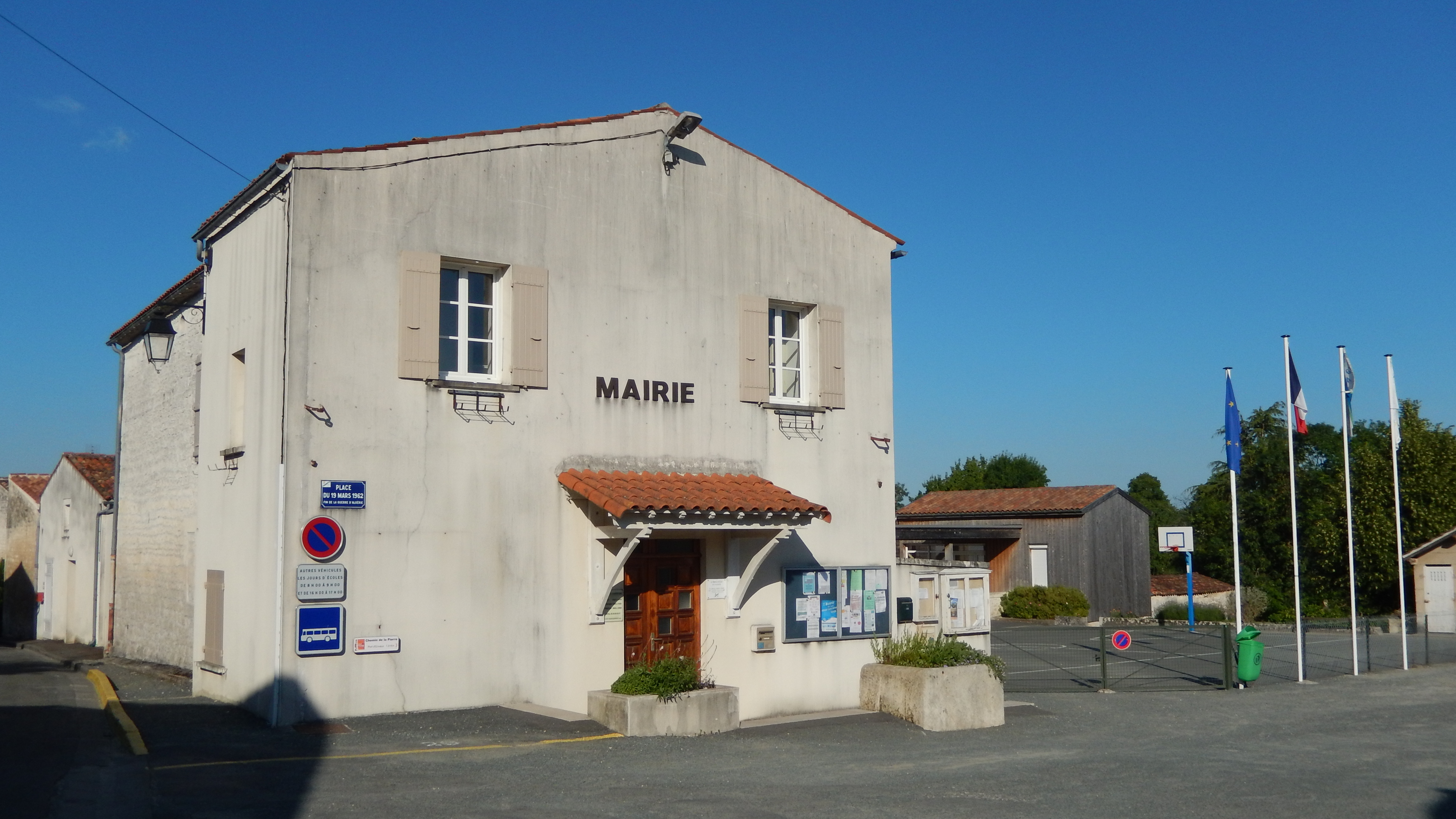 La mairie de Crazannes (Charente-Maritime, France).